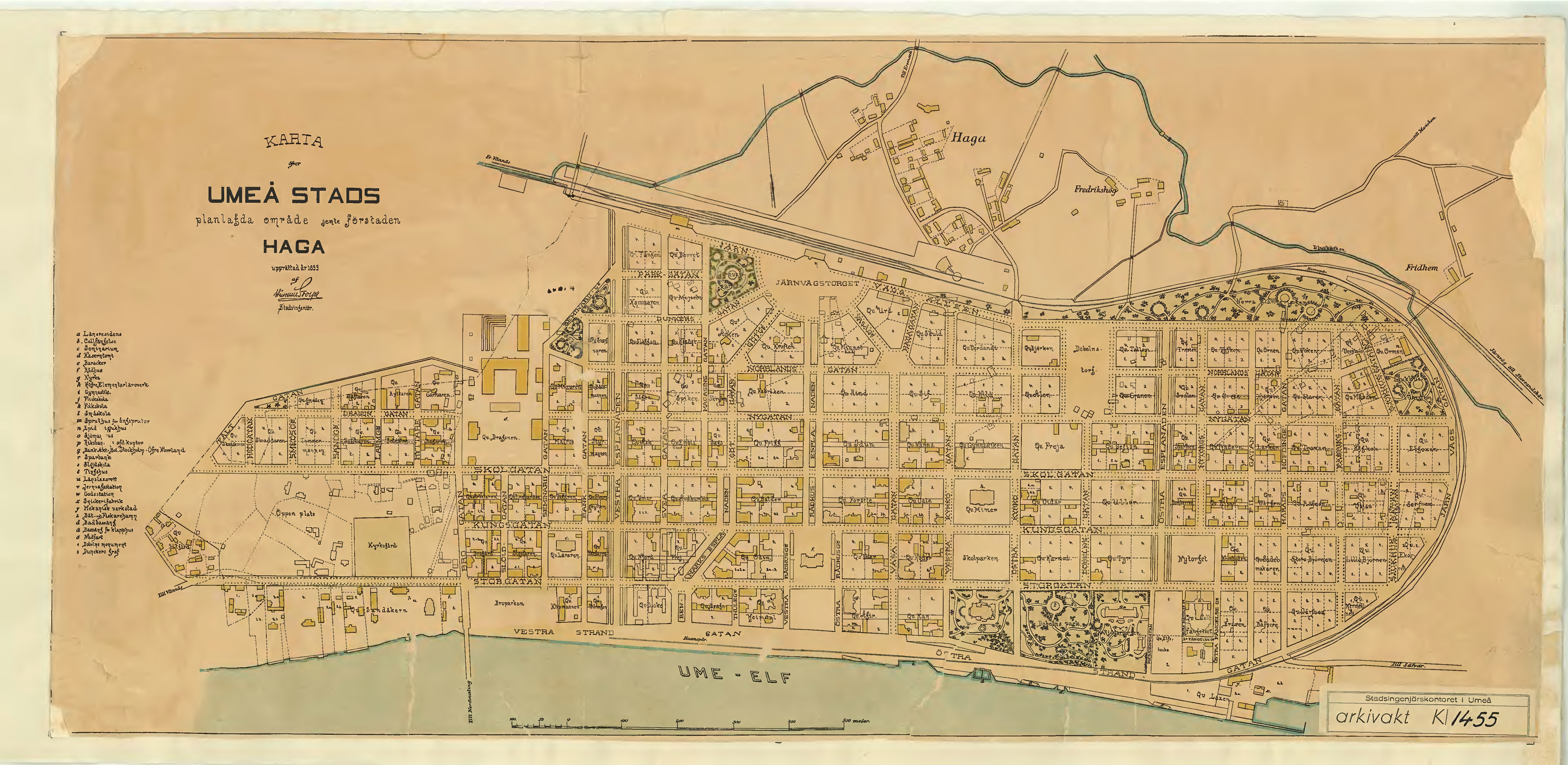 Stadsplan för Umeå stad med Haga år 1899 ("Karta öfver Umeå stads planlagda område jemte förstaden Haga"). Upphovsman Wilhelm Stolpe. Tryckt av W Silversparres Nya Grafiska bolag.